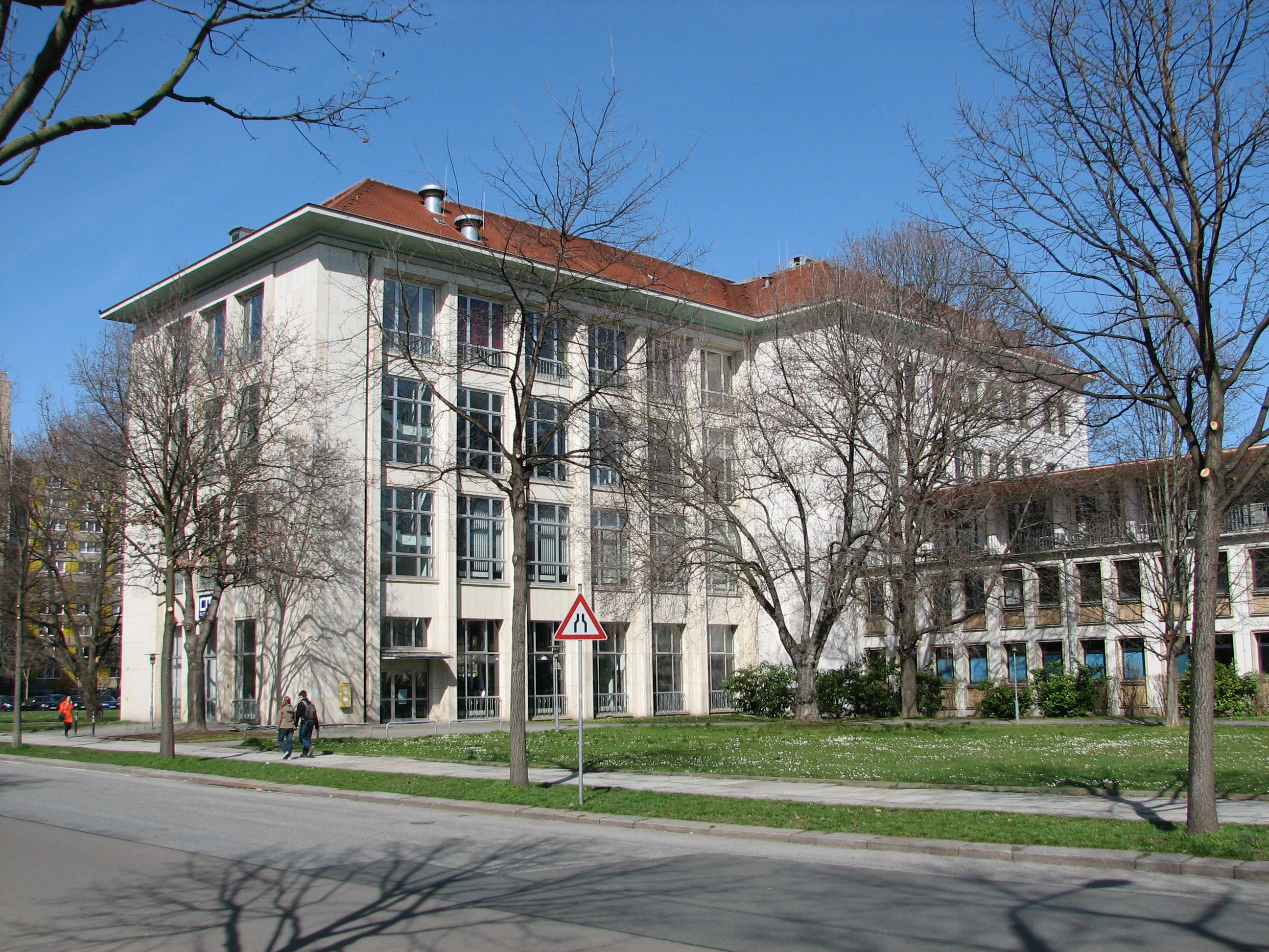 Mensa-Gebäude Reichenbachstraße mit Anbau rechts